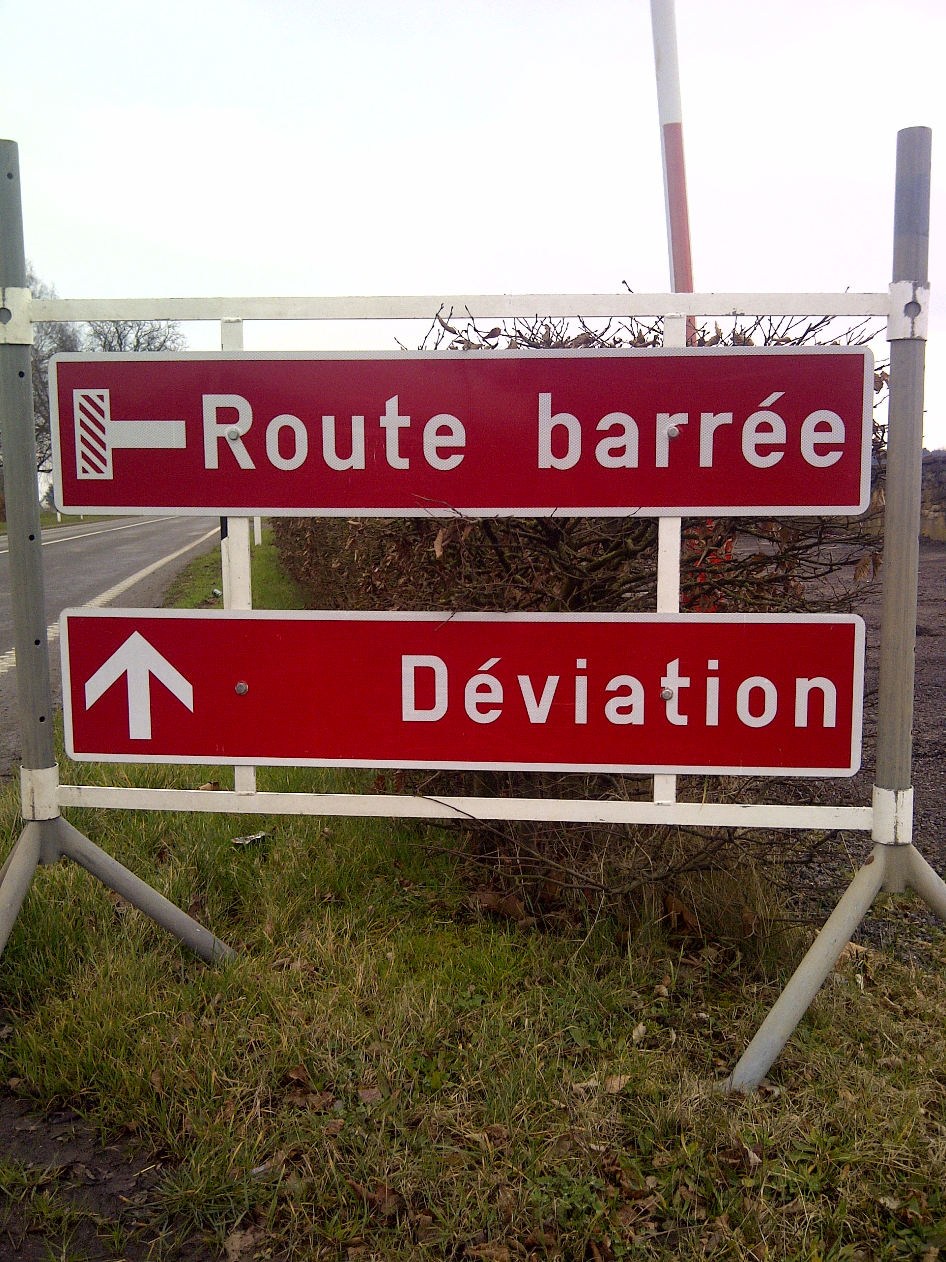 Verkéiersschëld E,22b "Route barrée - Déviation" aus dem lëtzebuerger Code de la Route.